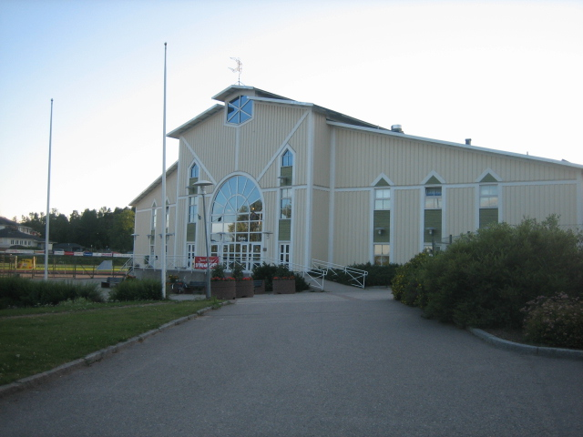 Entrén till Glysisvallen, Hudiksvalls fotbolls- och hockeyarena.